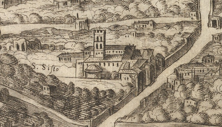 Pianta di Tempesta